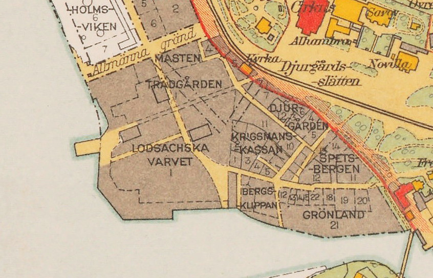 Stockholms stad med omnejd 1917-1934 (Djurgårdsstaden)